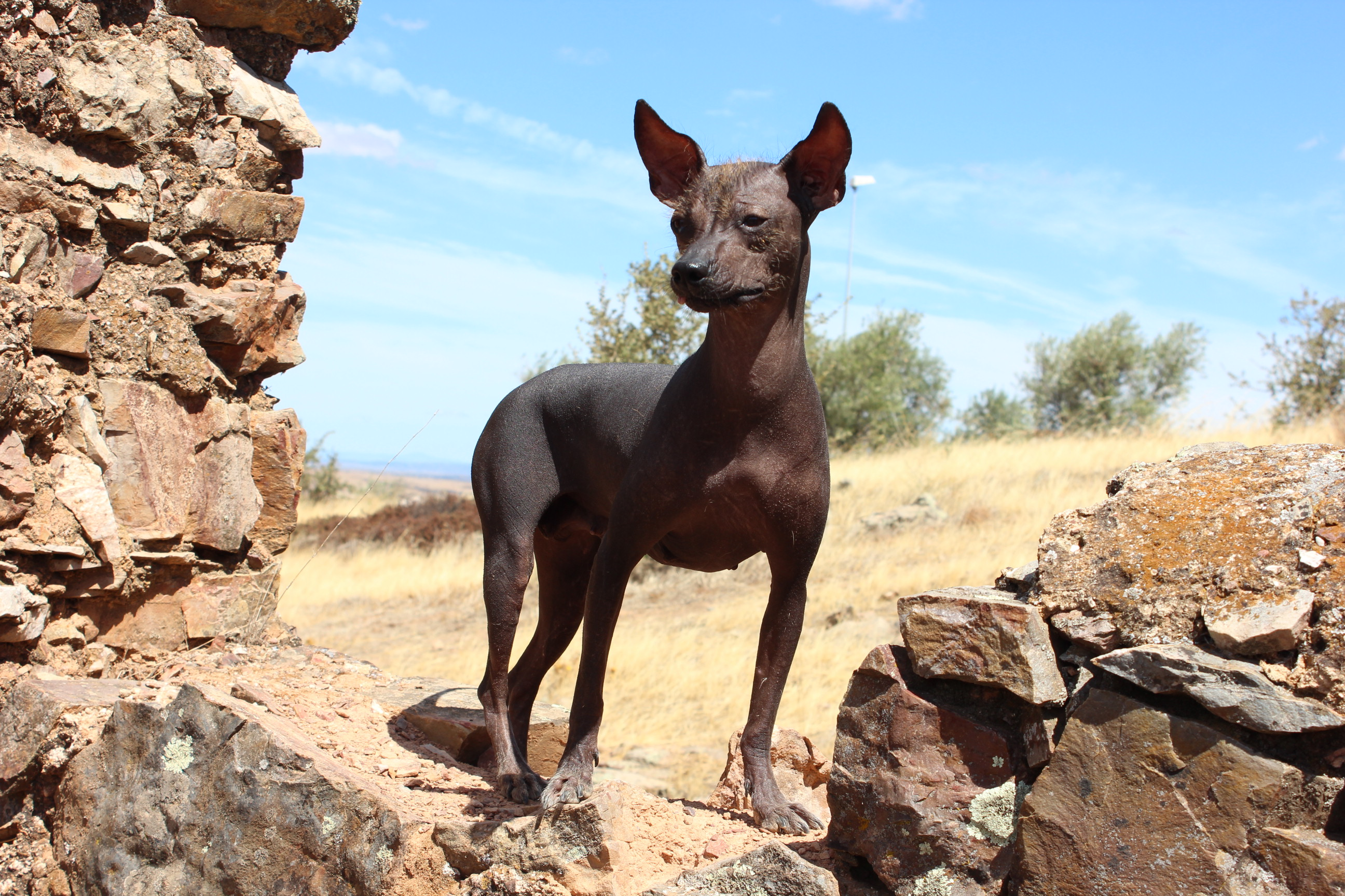 Perro sin pelo del Perú, también denominado viringo o calato. Caracterizado por la ausencia de pelo y sus formas elegantes.